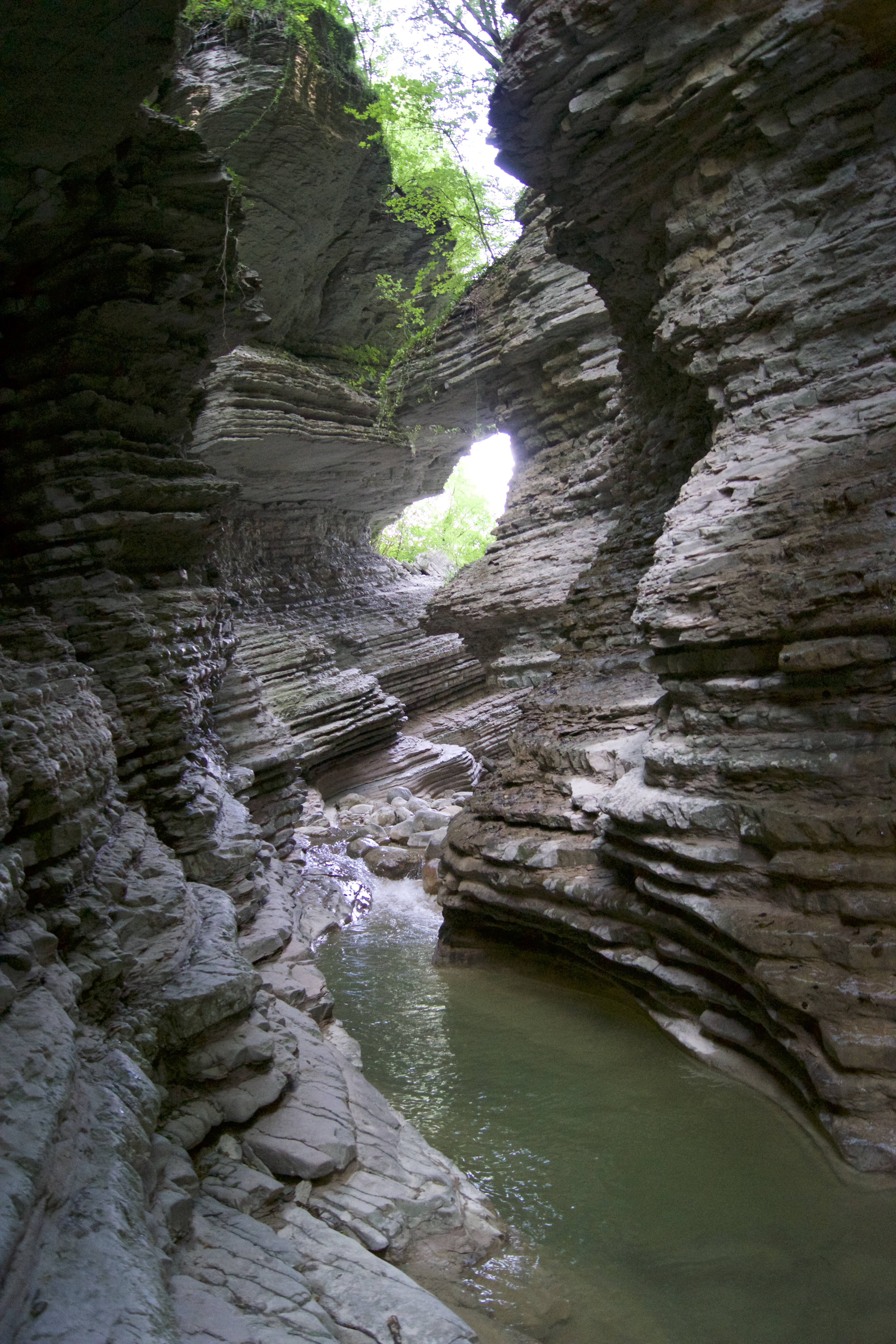 Valpiana - Valmorel (Aree palustri) (Q49963648)